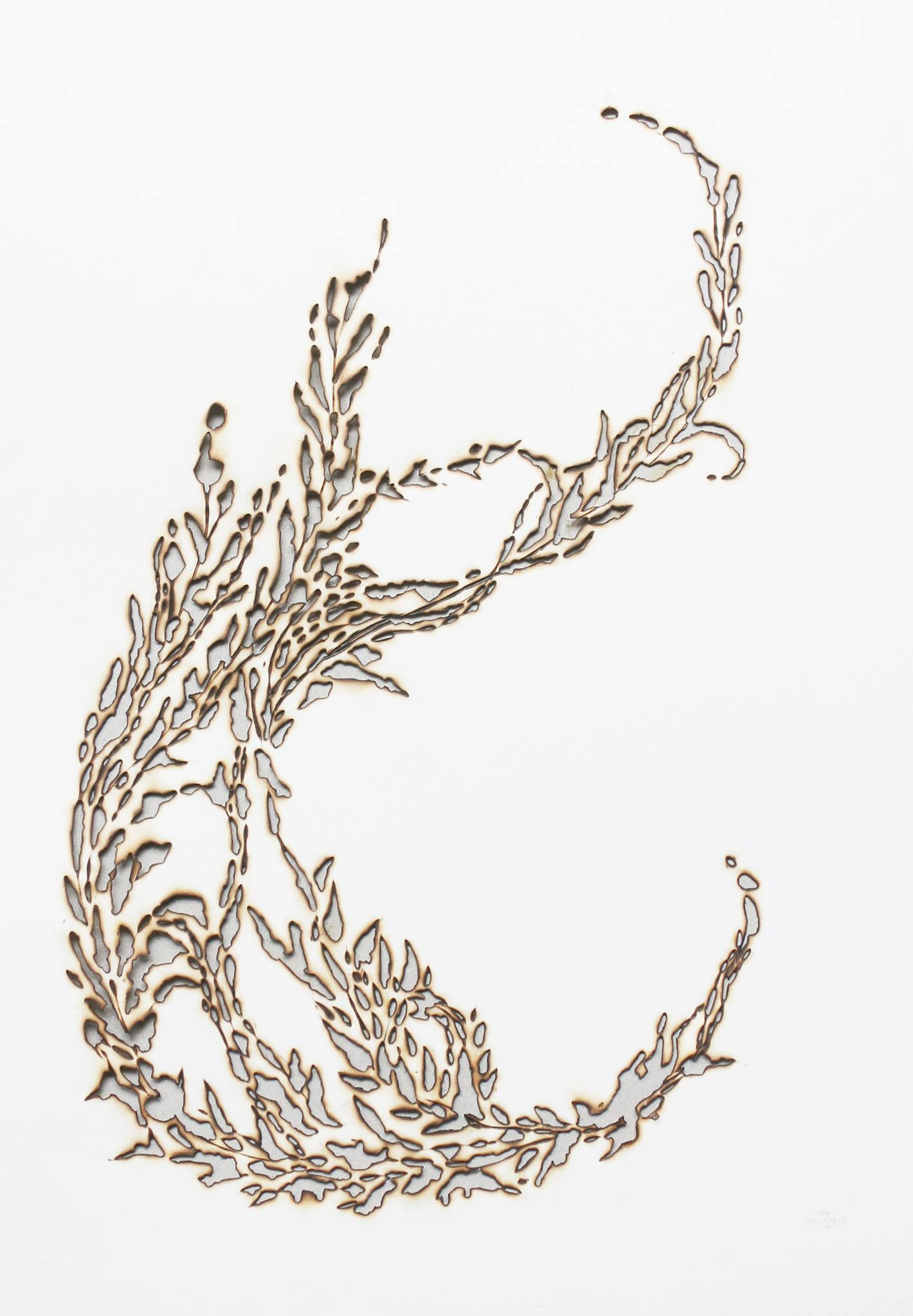 Praca Zuzanny Dolegi z cyklu "Herbarium" wykonana na papierze techniką pirografii.